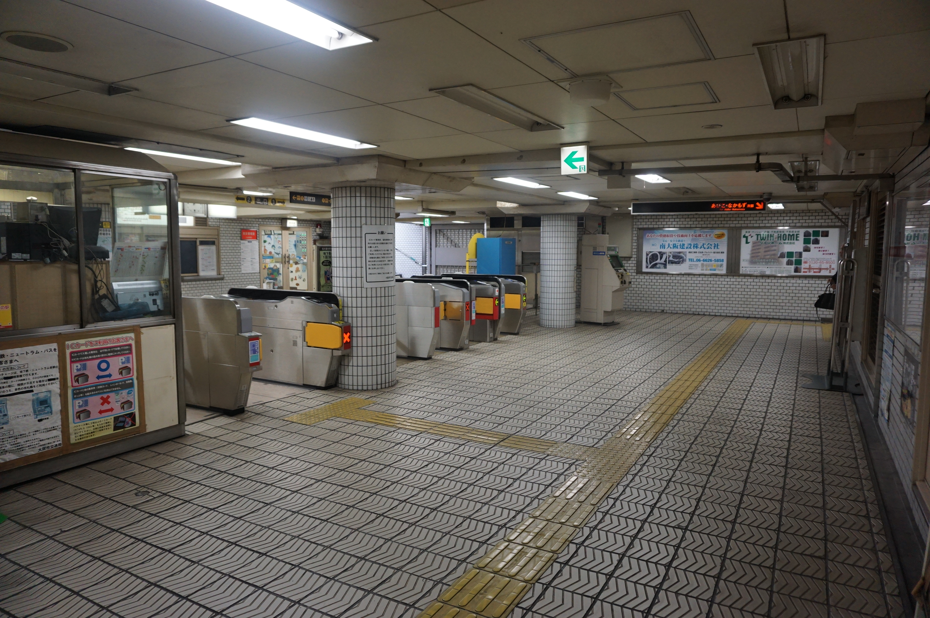 千里中央寄りの北改札口